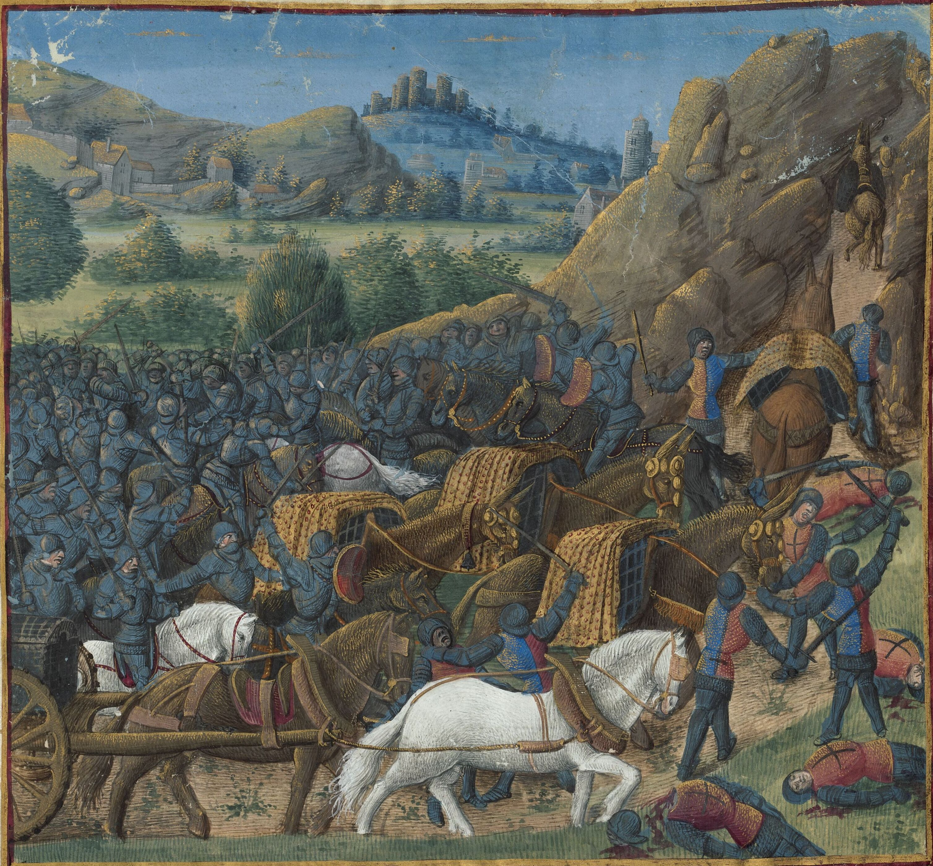 Miniature: Riccardo Filangieri attacks pilgrims